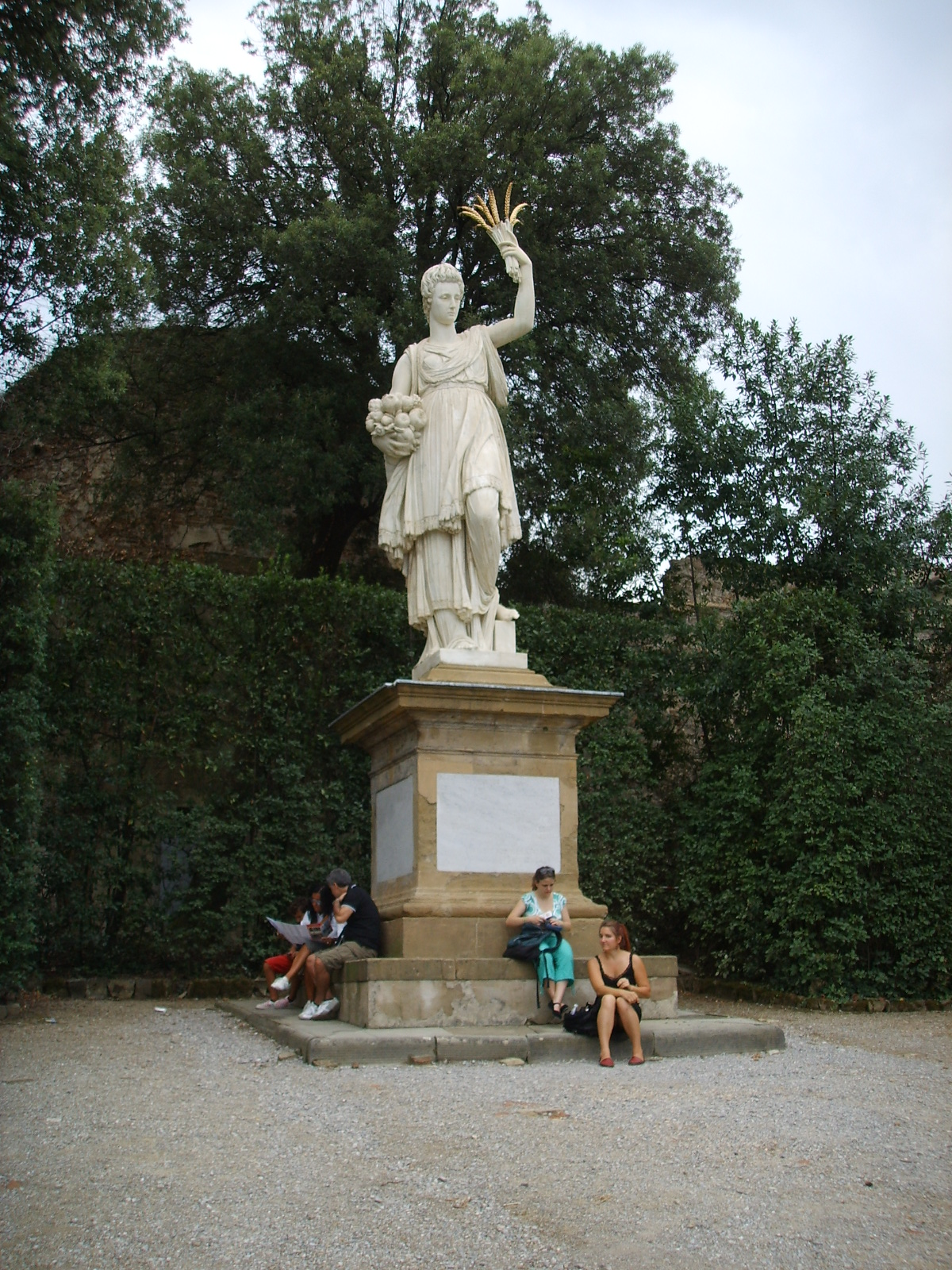 Boboli, statua dell'Abbondanza (1636) di Pietro Tacca, (Giovanna d'Austria)